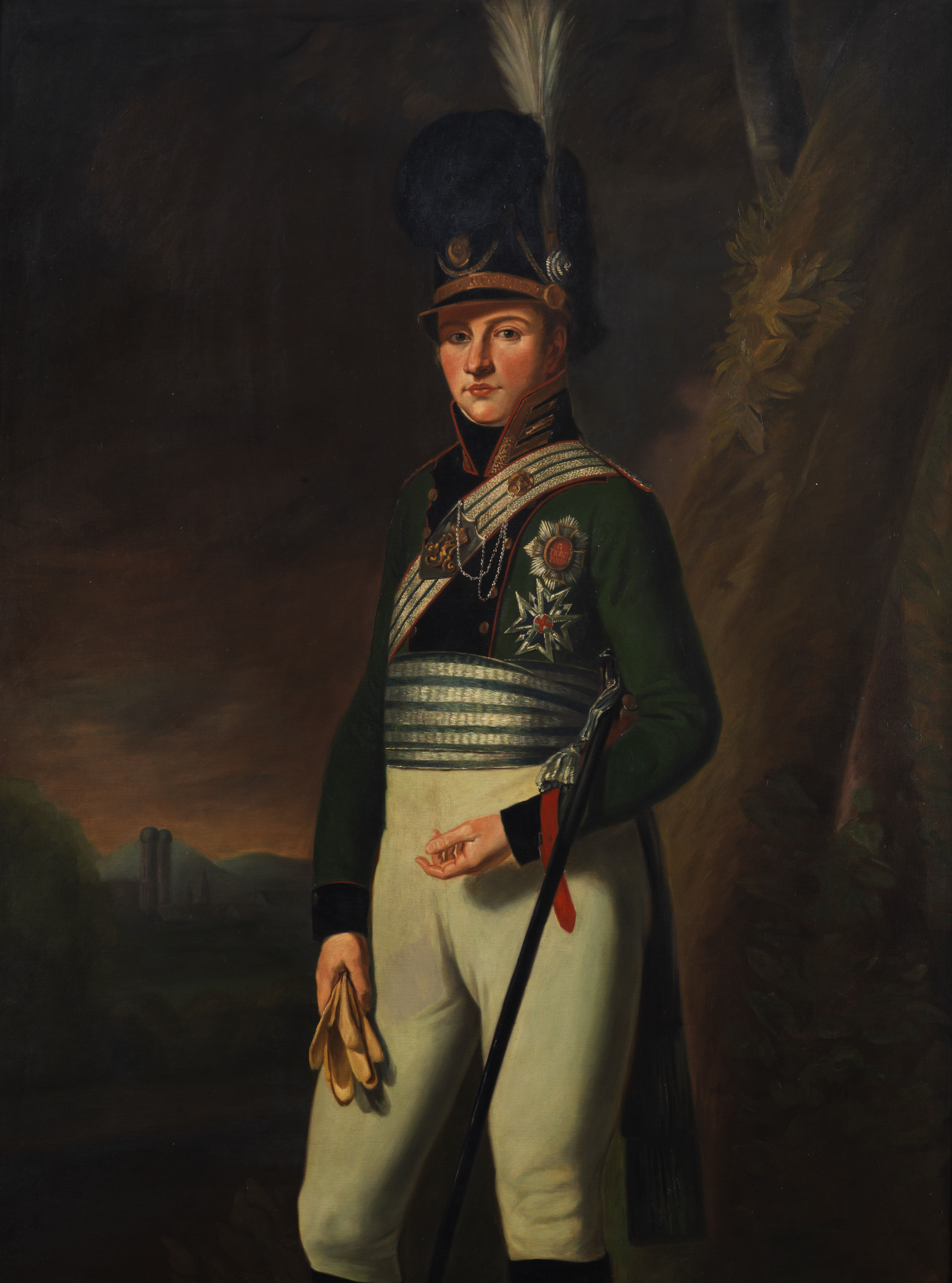 Anonym (wohl ein bayerischer Hofmaler): Kronprinz Ludwig (der spätere König Ludwig I.) als Oberst des Chevau-légers-Regiment „Kronprinz“; Öl auf Leinwand, 164 x 123 cm. Provenienz: Baron von Eberstein.